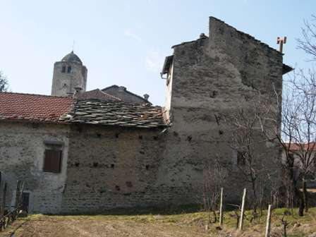 Castello di Bruzolo Colombaia sullo spigolo Nord-Est della cinta esterna vista da Est